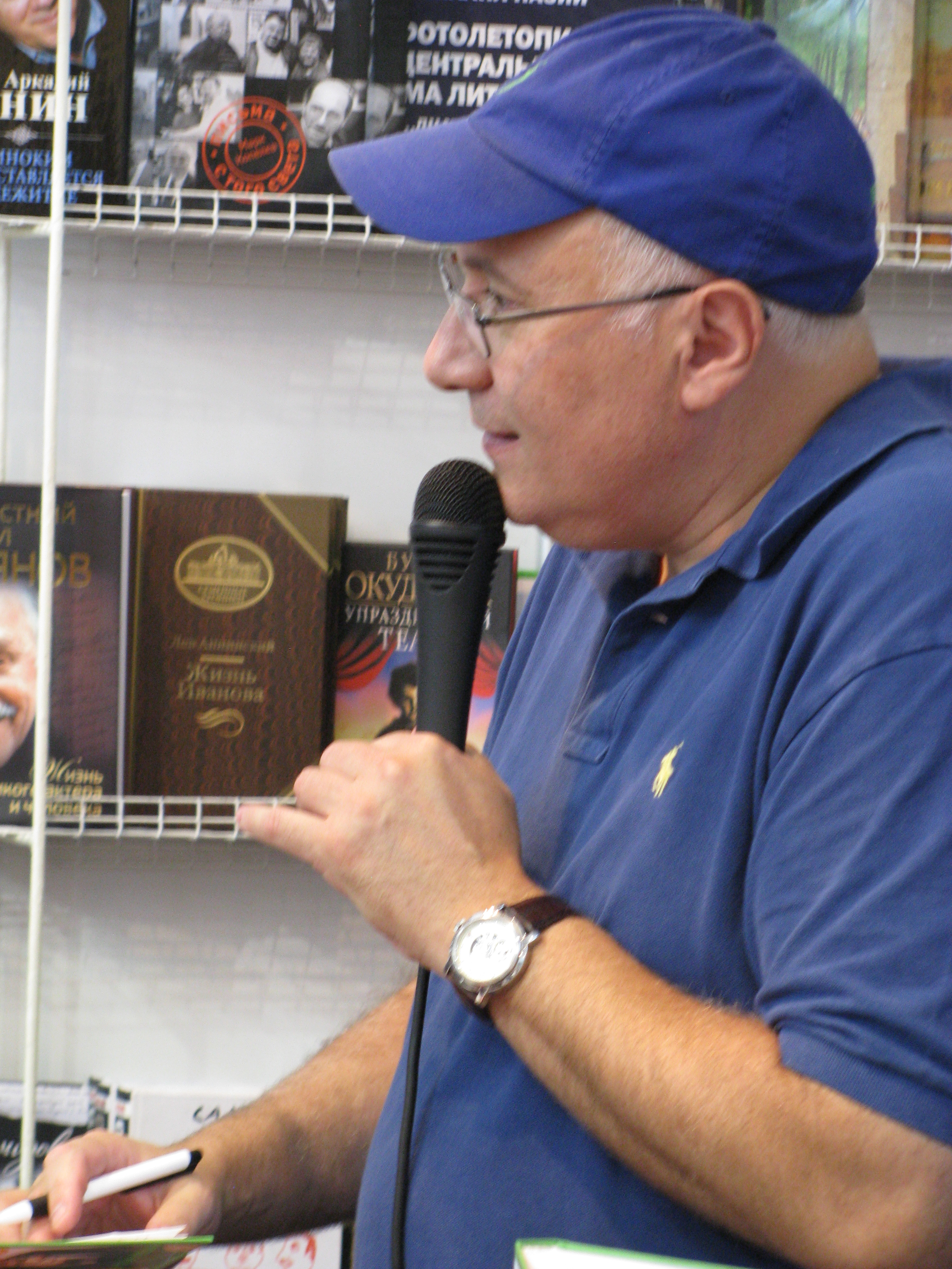 Матвей Ганапольский на ММКВЯ-2011